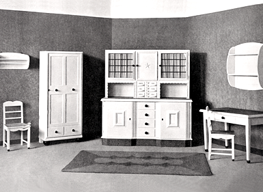 poggenpohlkitchen